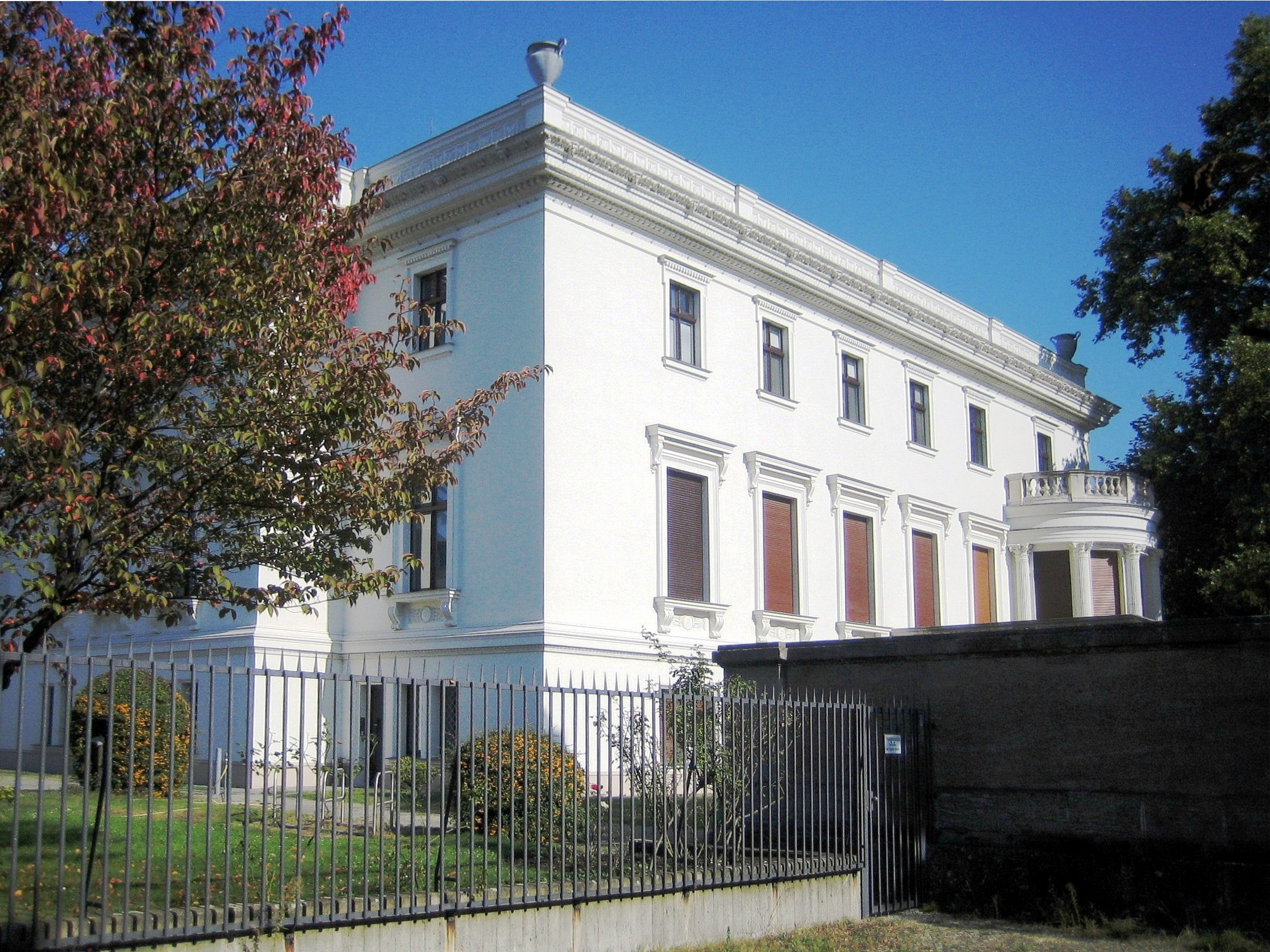 Die Villa von der Heydt am Landwehrkanal in Berlin, Sitz des Präsidenten und der Hauptverwaltung der Stiftung Preußischer Kulturbesitz (SPK). Südseite des Gebäudes.